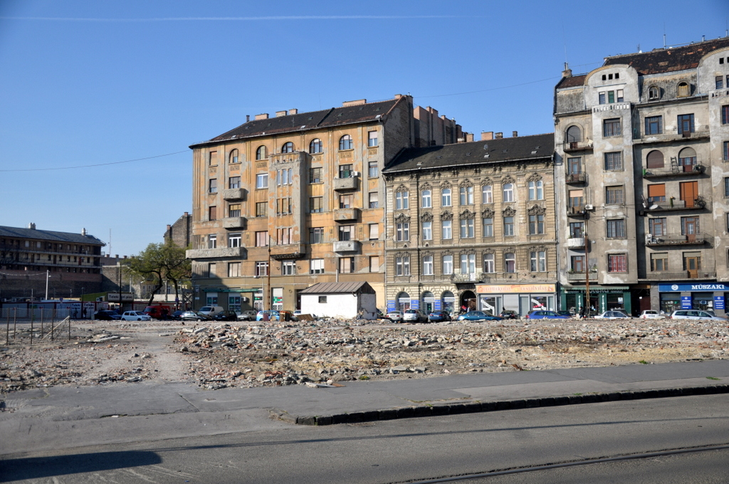 Teleki László Square, site of the former market, Budapest District VIII